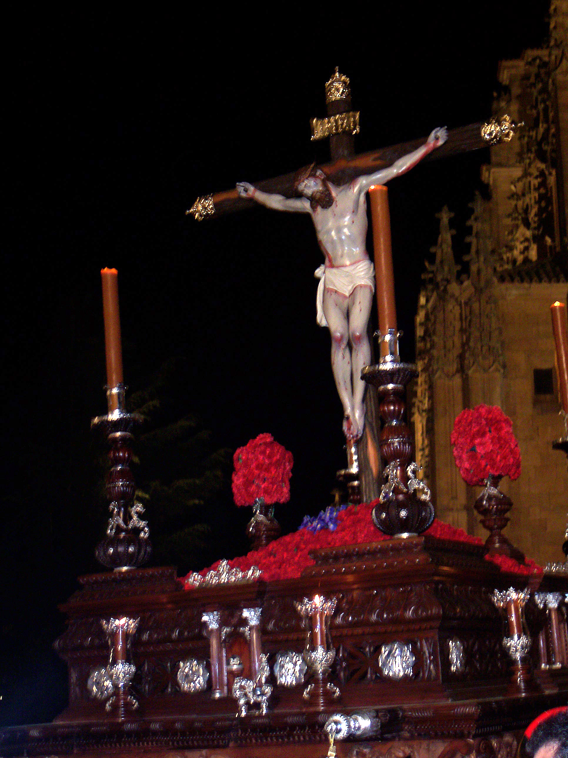 Stmo. Cristo de la Buena Muerte. Hemandad Dominicana. Salamanca (España)